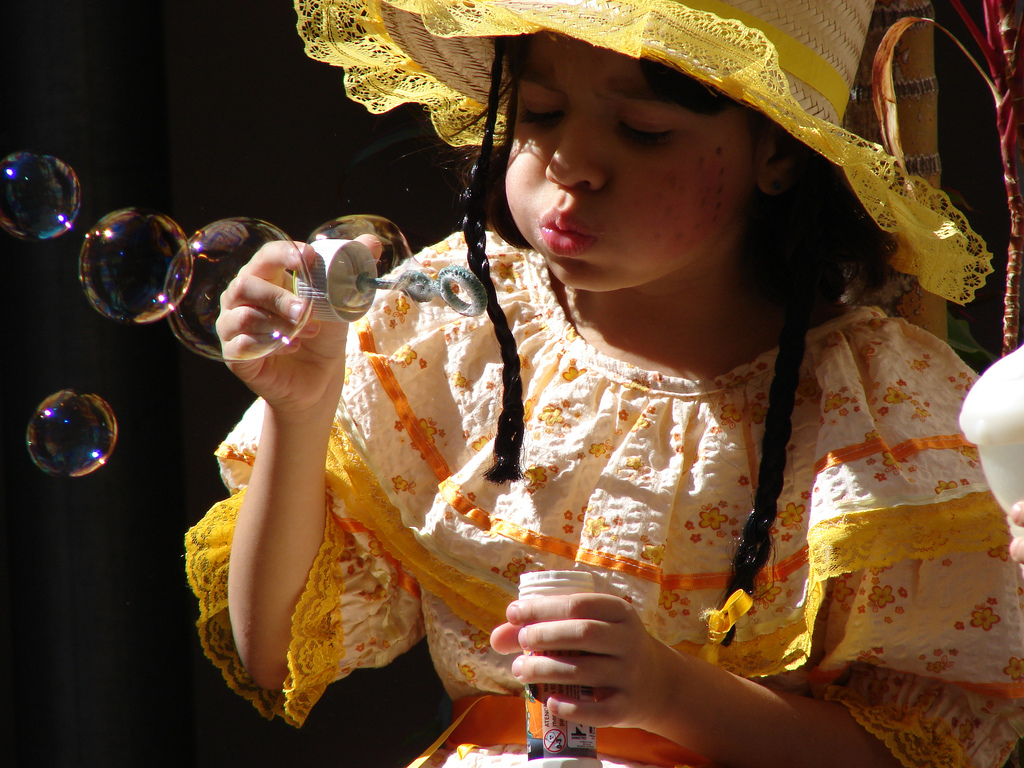 Um click de festa junina.